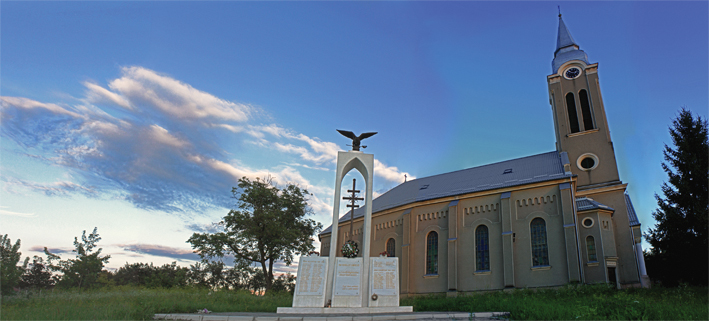 Karasztelek, turul szobor